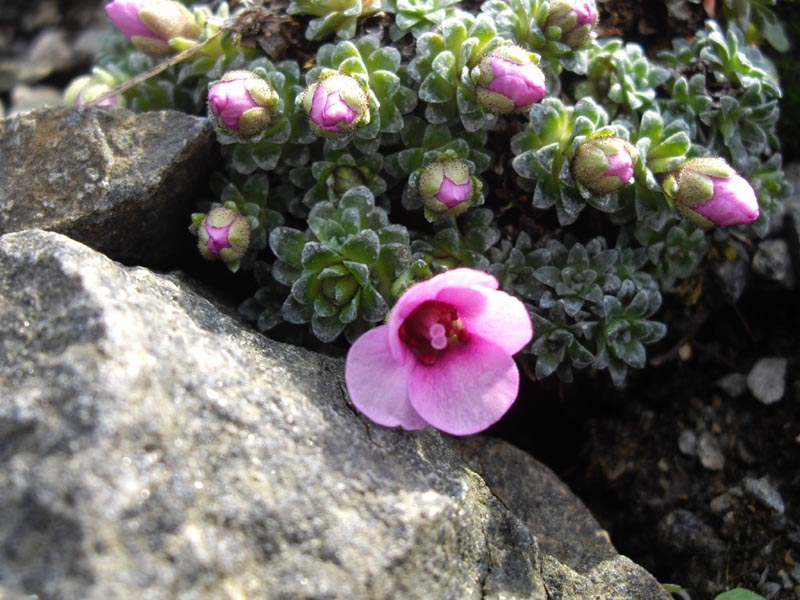 Saxifraga × anglica 'Myra'